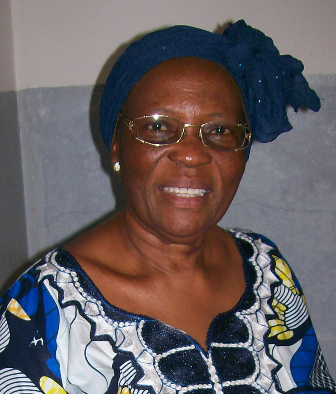 L'ancienne présidente de l'Organisation des femmes révolutionnaires du bénin est décédée le 4 janvier 2017 à Paris des suites d'une longue maladie.